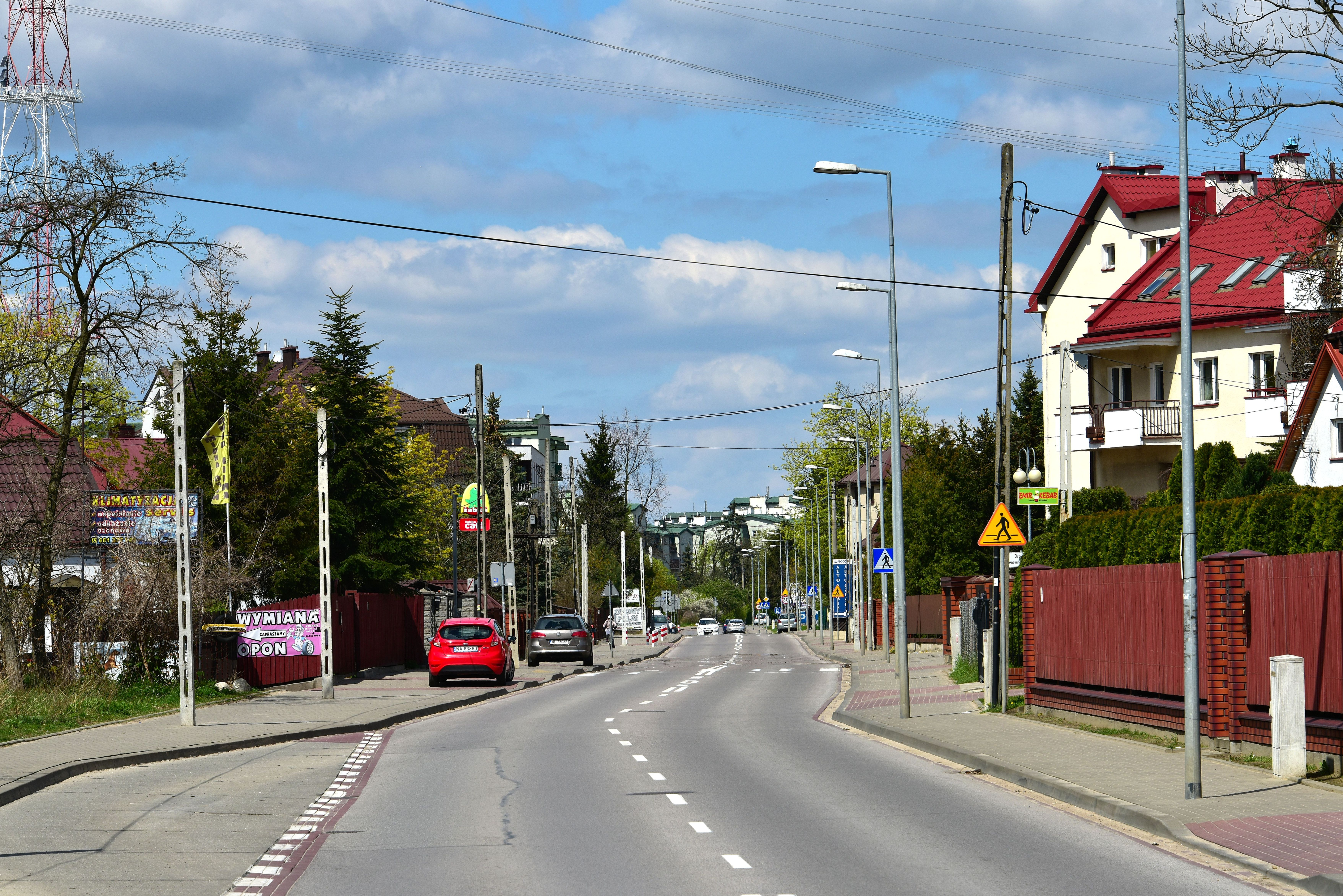 Ulica Nowodworska przy ul. Mehoffera w Warszawie